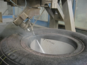 Découpe d'un pneu aéronautique pour expertise